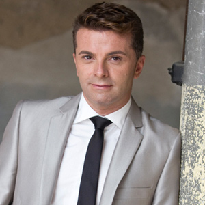 propia